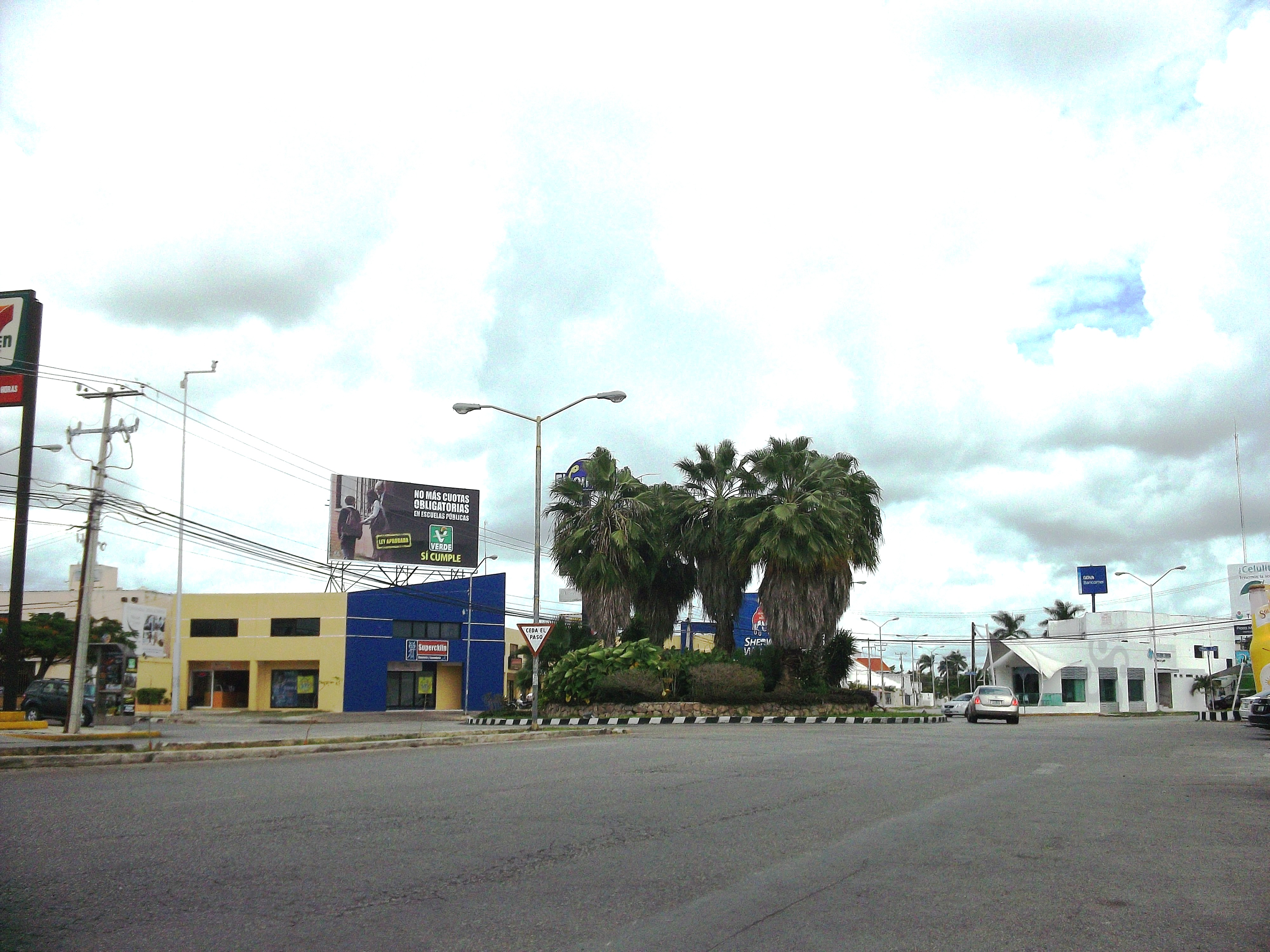 Glorieta en el actual fraccionamiento San Antonio Cinta, Yucatán.